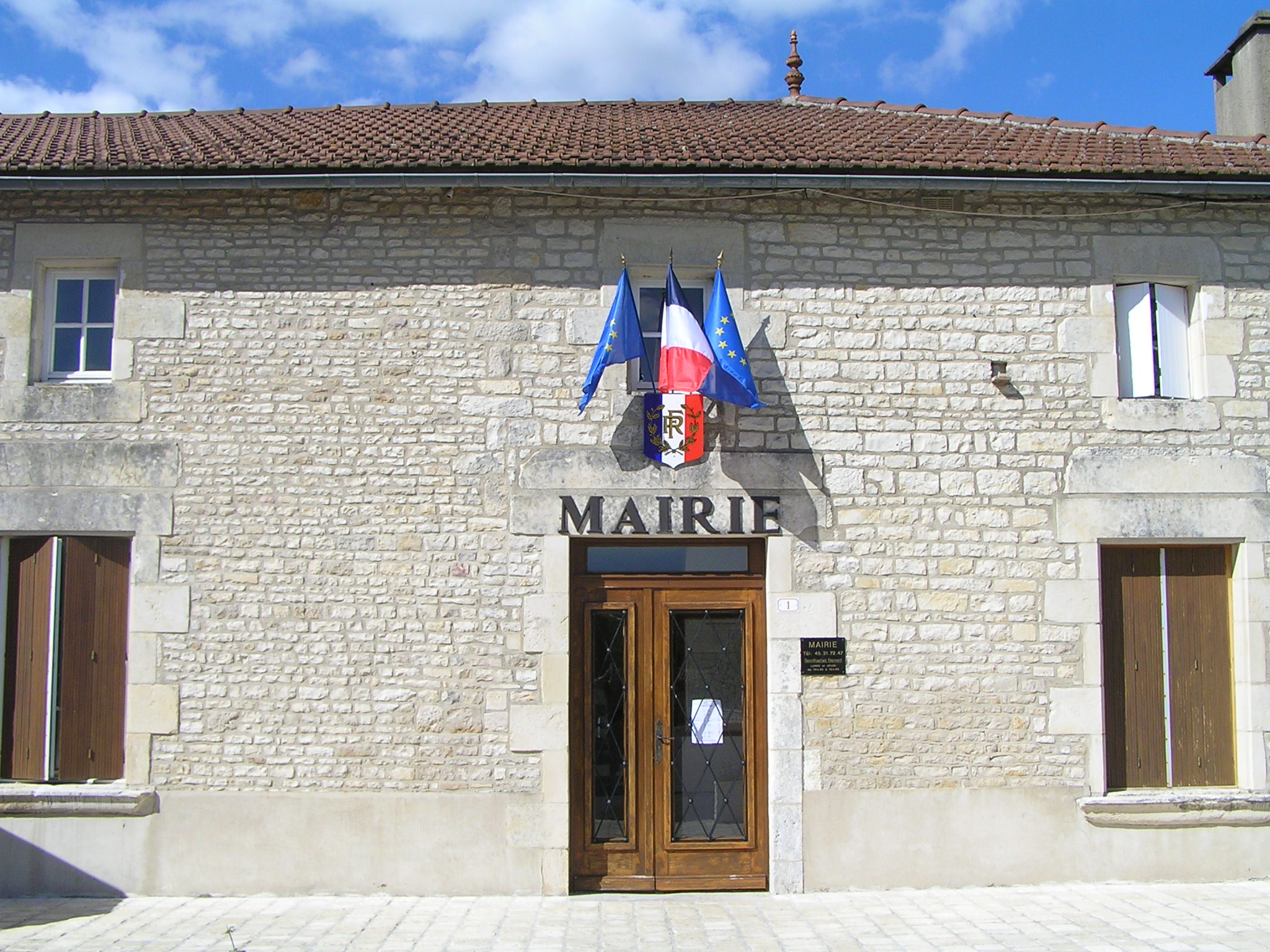 mairie de Theil-Rabier